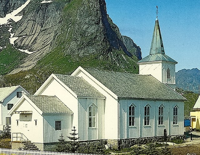 Reine kyrkje en: Reine church